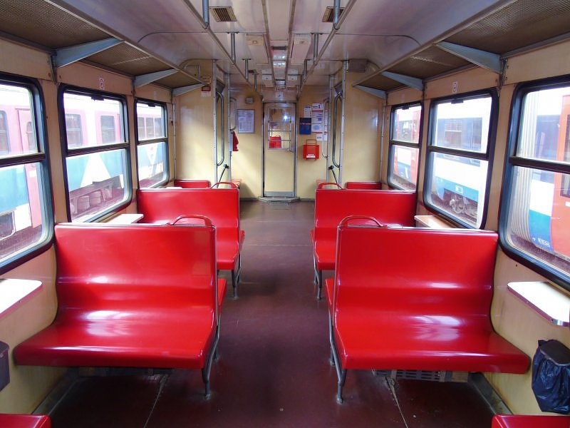 Wnętrze elektrycznego zespołu trakcyjnego EN94-40.